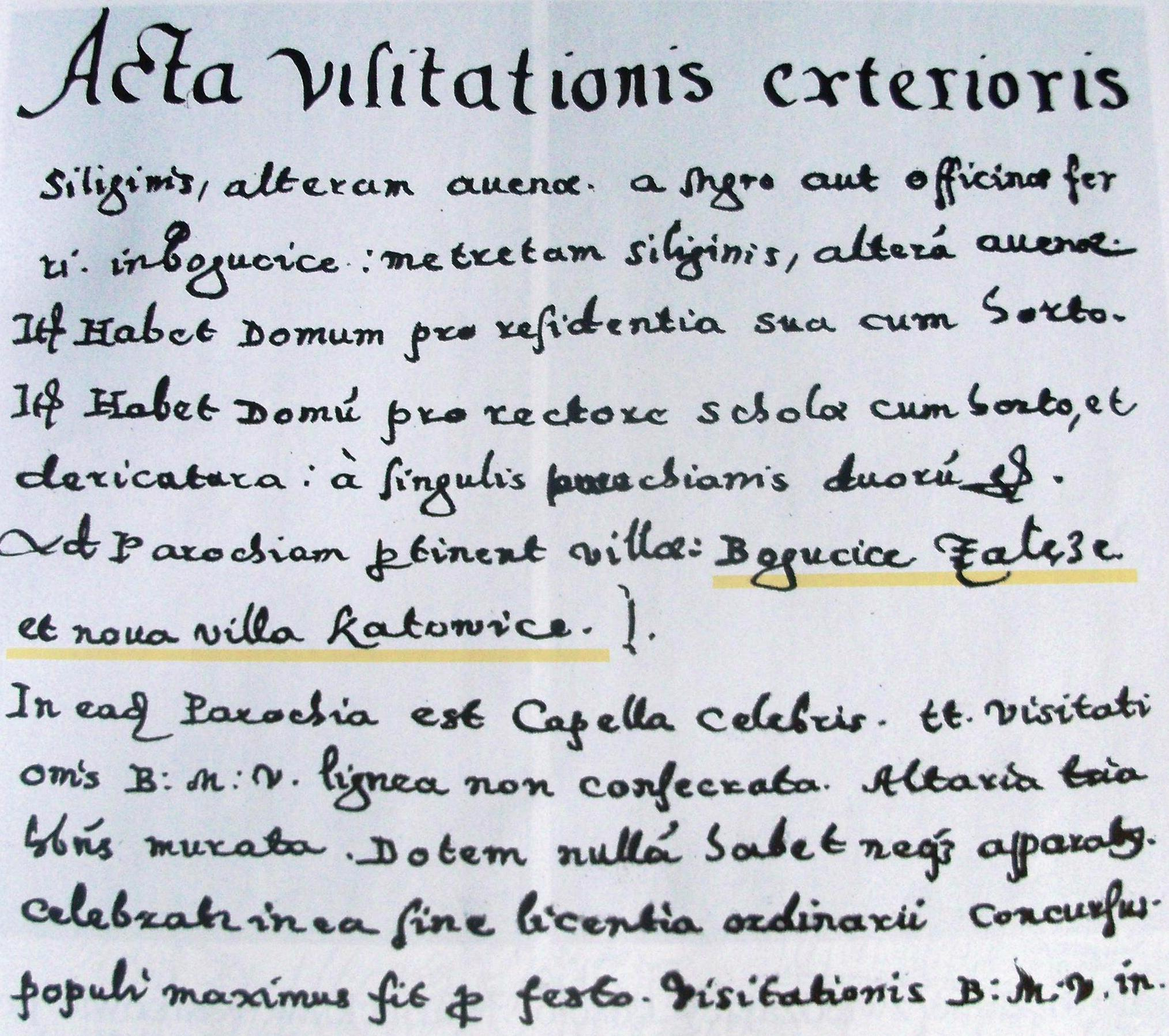 Początek rękopiśmiennej karty tytułowej "Akt wizytacji parafii bogucickiej" z 1598